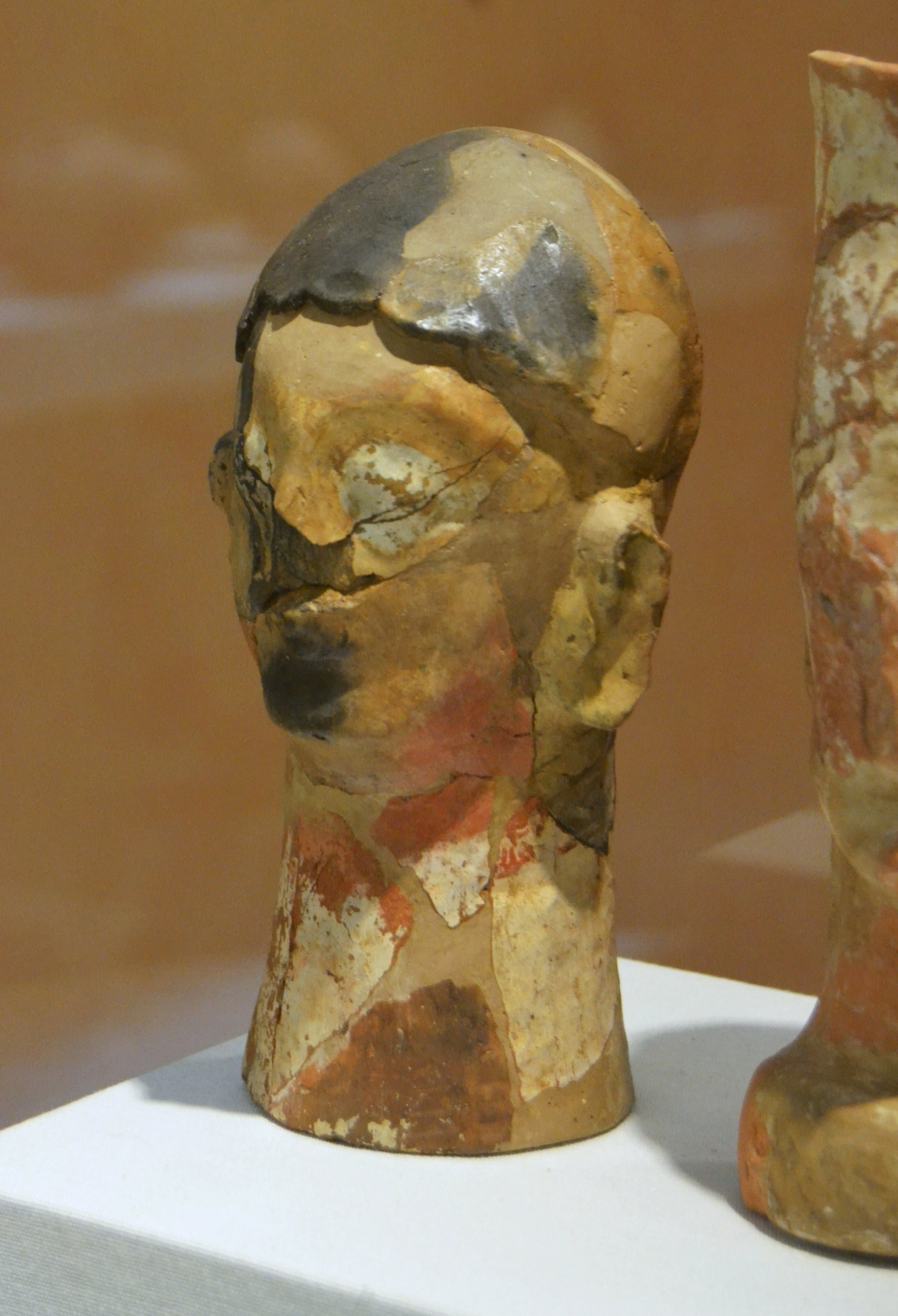 Cap votiu de terracotta, Puntal dels Llops (Olocau, el Camp de Túria), Museu de Prehistòria de València.